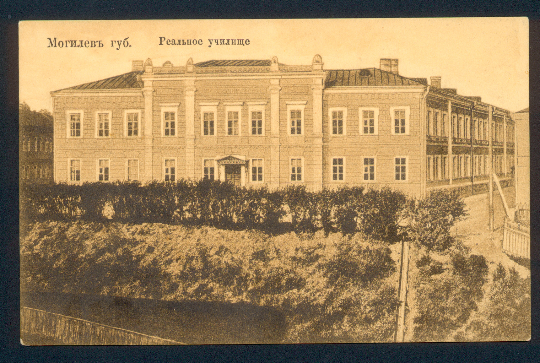 Могилёв губернский. Реальное училище. Почтовая карточка.